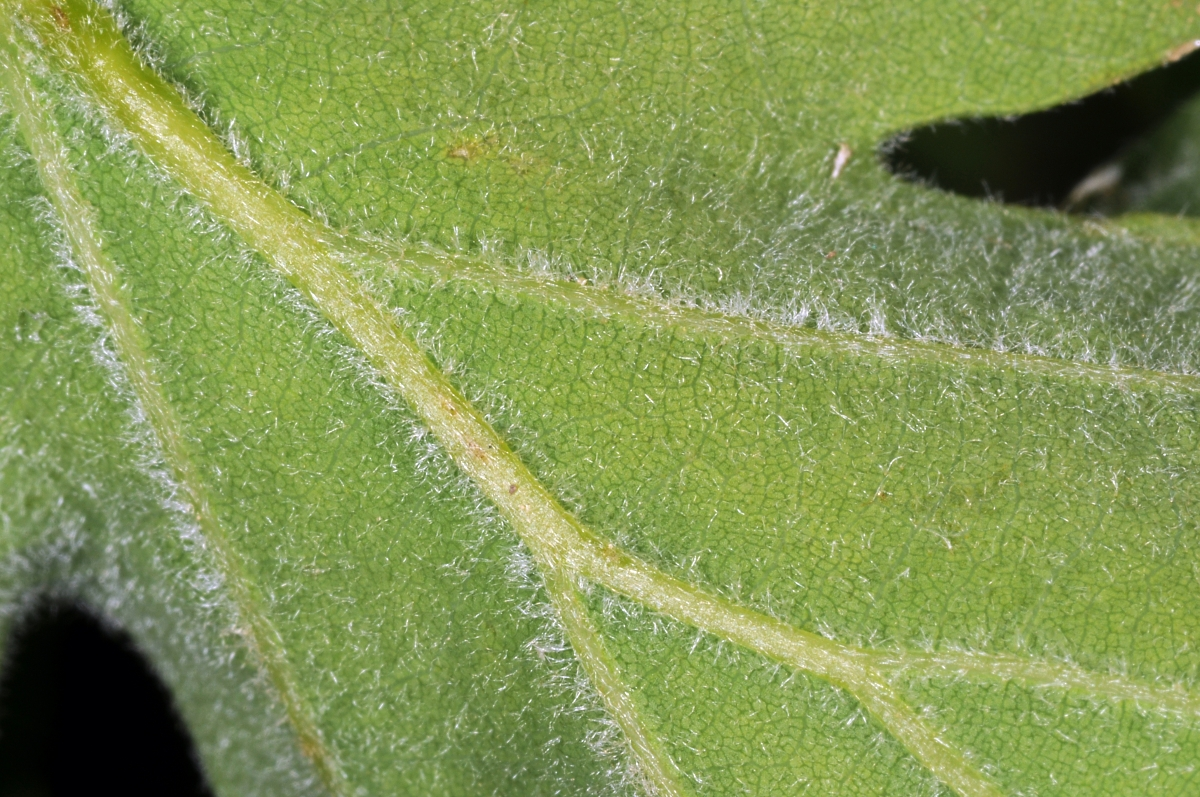 Quercus pubescens, Botanischer Garten auf den Lahnbergen, Marburg, Hessen, Deutschland